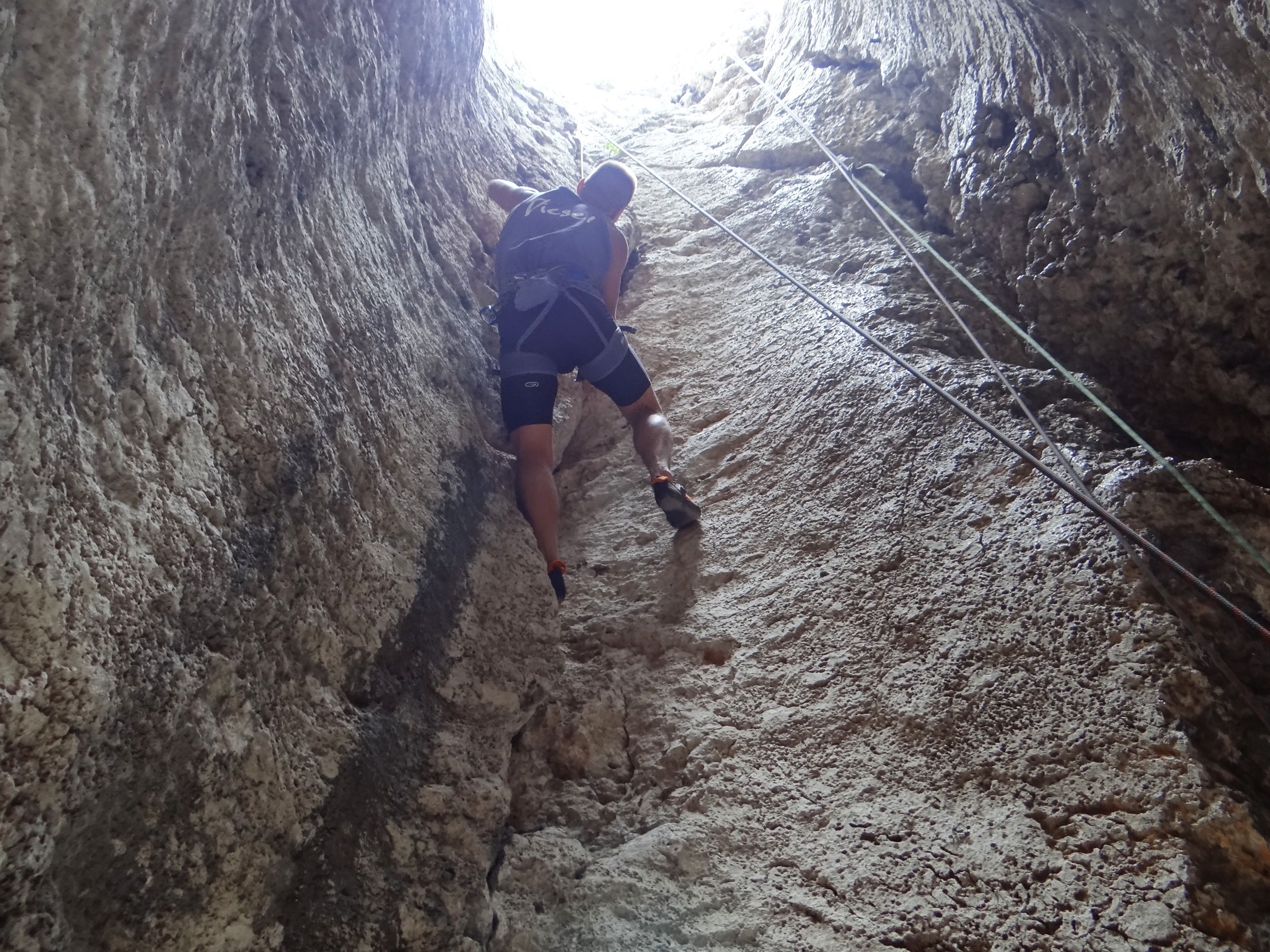 Komin w Studnisku Rzędkowickim